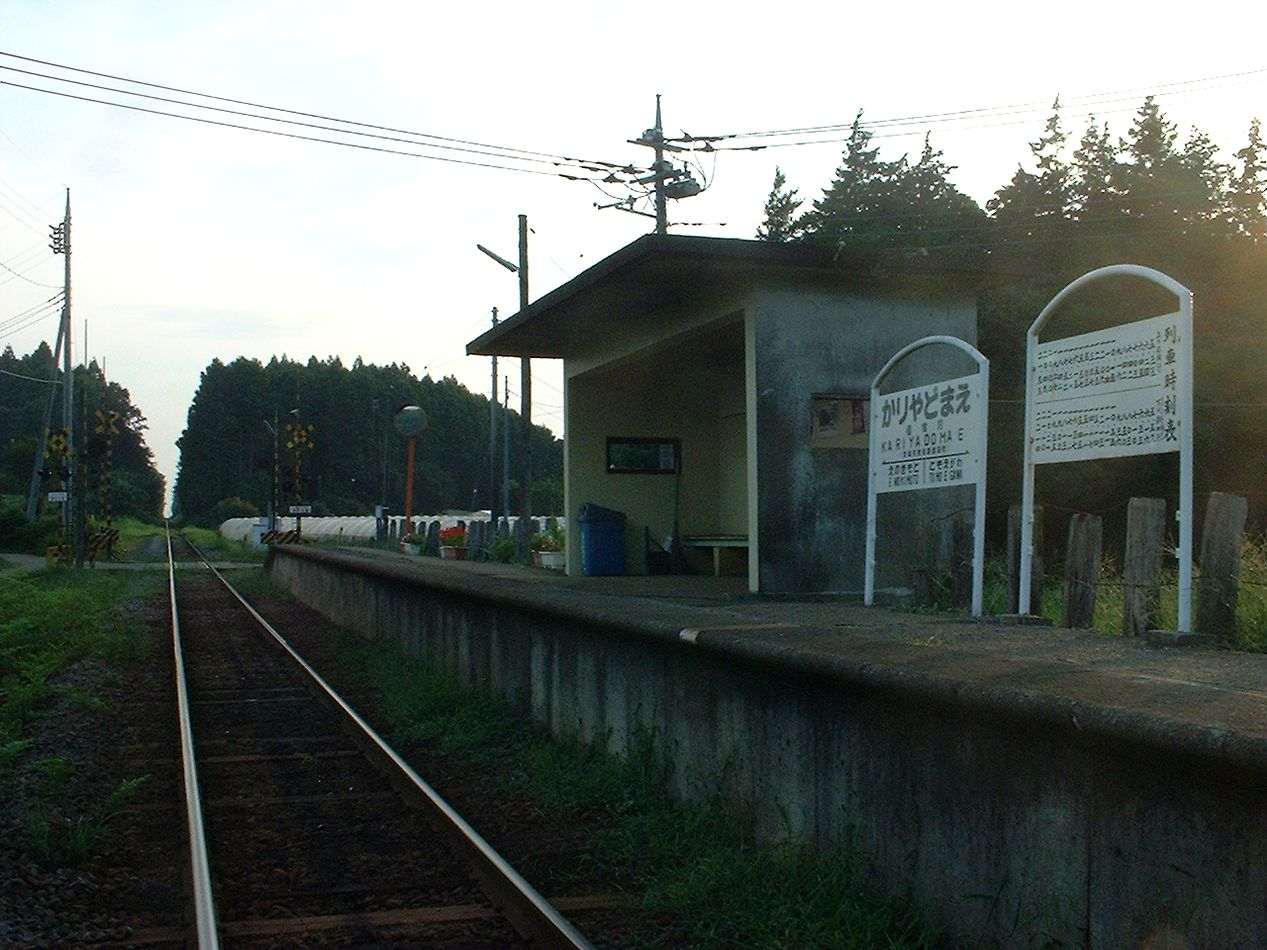 鹿島鉄道 借宿前駅 榎本駅方面を望む